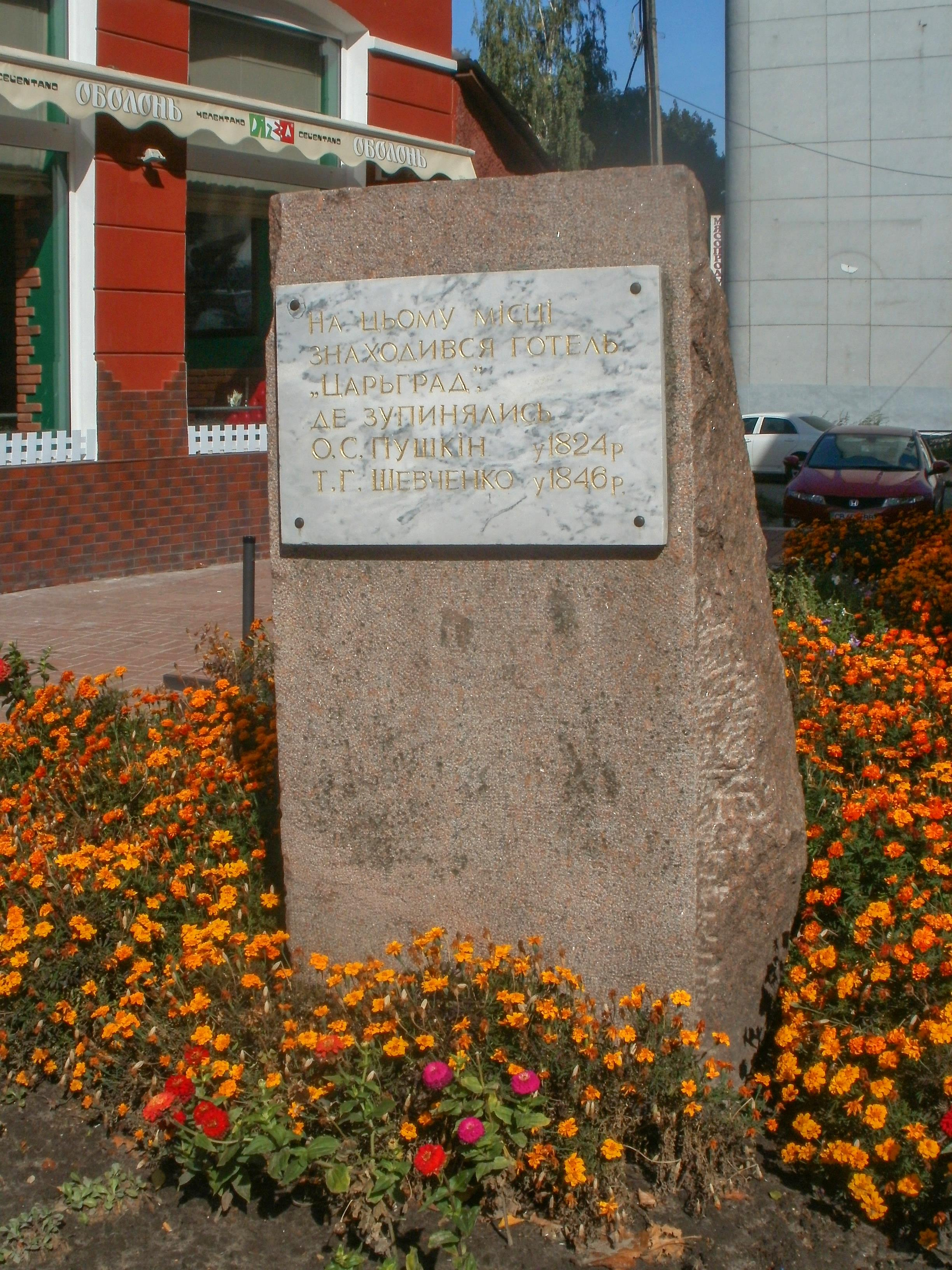 Місце, де знаходився готель «Царьград» ХІХст., в якому зупинялись О.С. Пушкін – у 1824р., та Т.Г. Шевченко – у 1846р., Чернігів, проспект Миру, біля магазину «Янтар»